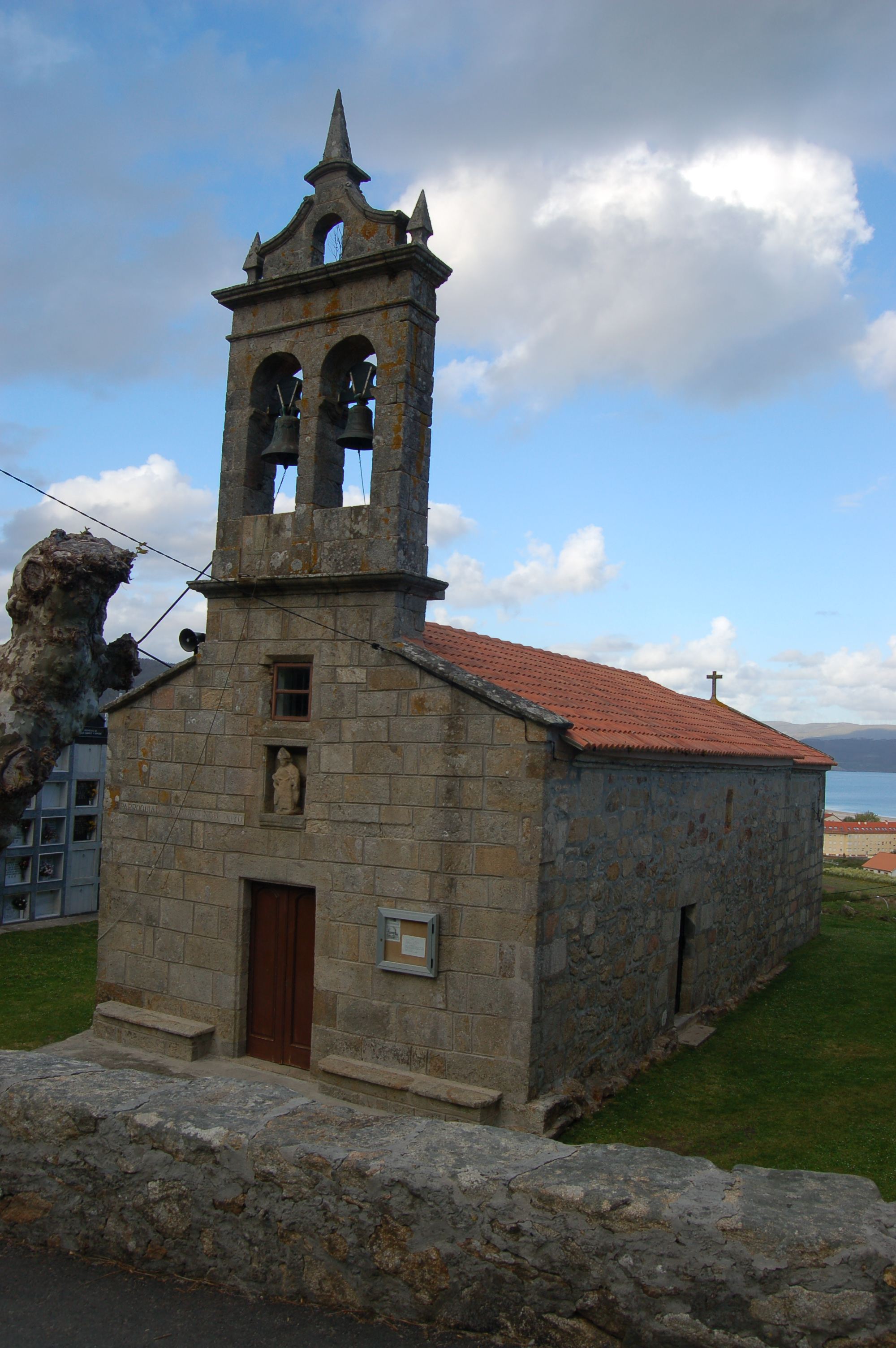 Igrexa parroquial de San Martiño de Duio (Fisterra).